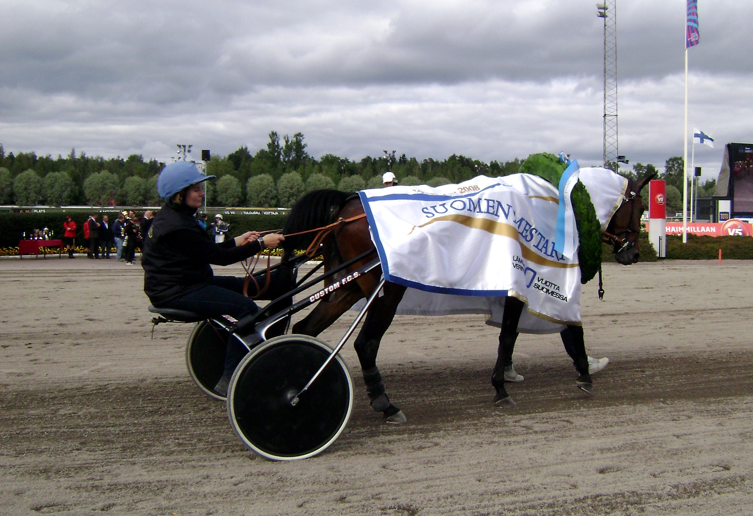 Passionate Kemp Vermossa elokuussa 2008.